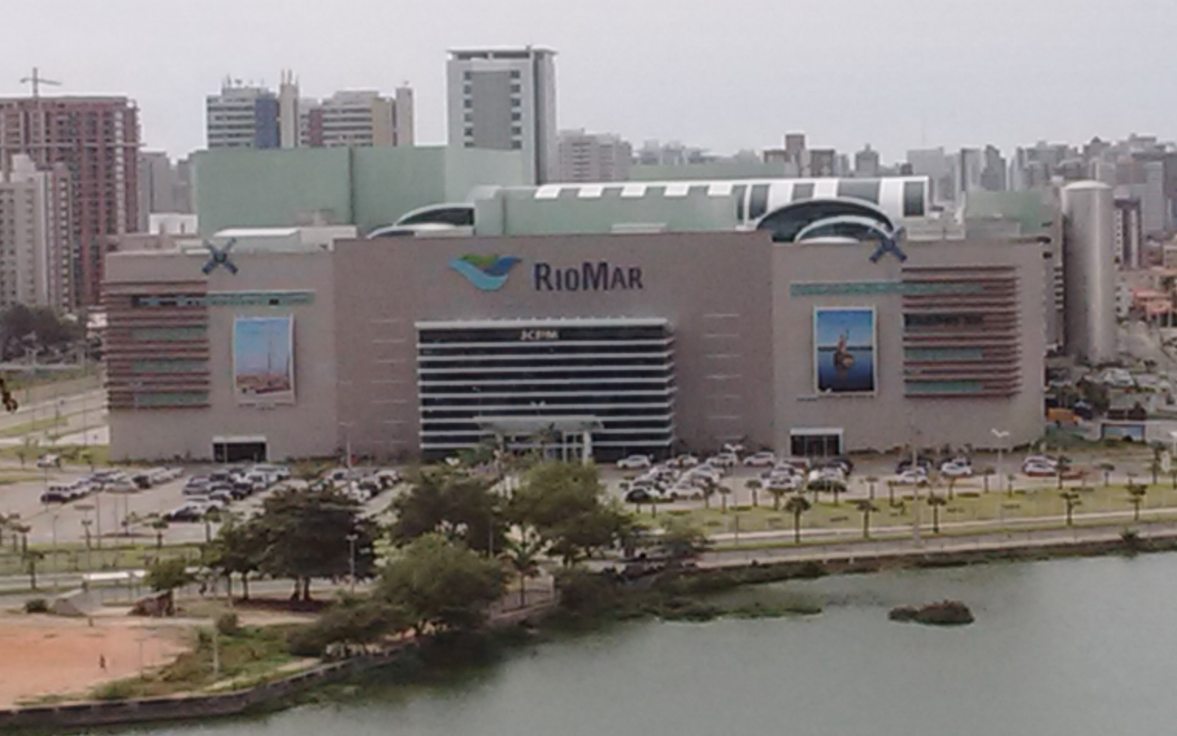 Shopping RioMar Fortaleza visto da Praça Monsenhor Amarílio. Fortaleza, Ceará, Brasil.